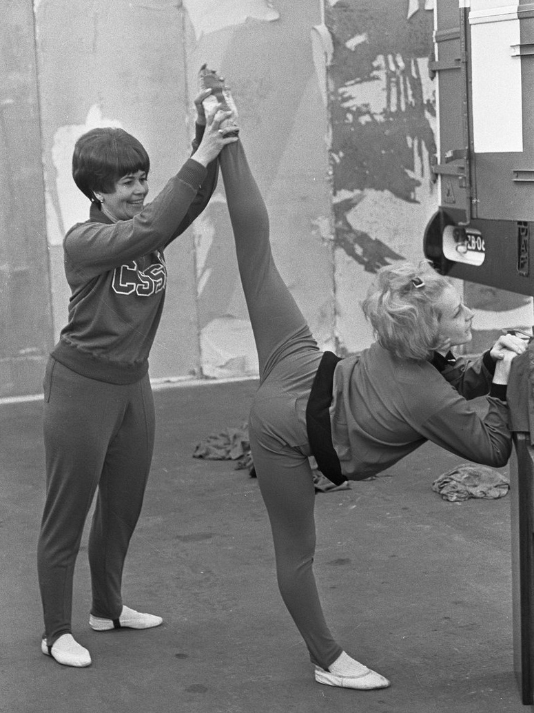 Věra Čáslavská with coach (left) at the European Championships